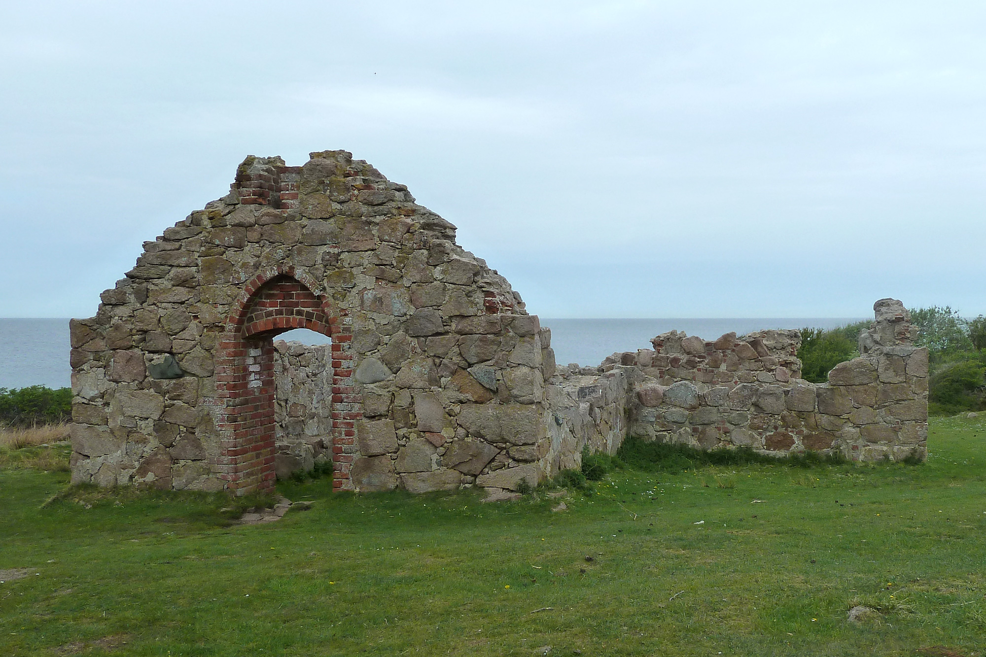 Salomons Kapel, eine mittelalterliche Kirchenruine an der Nordspitze Bornholms